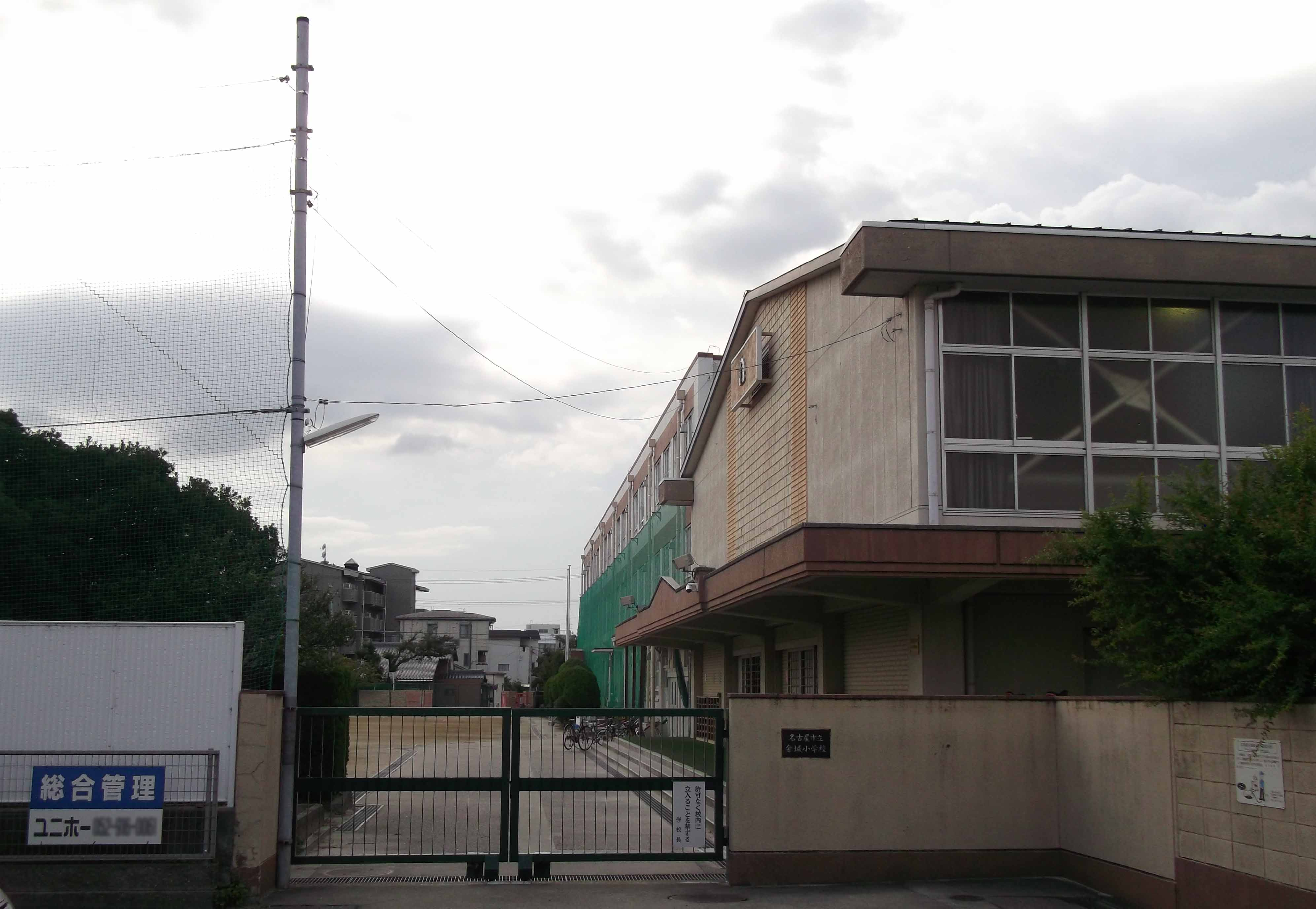 名古屋市北区金城の名古屋市立金城小学校を東側から写す。（画面左下看板電話番号部分画像加工）